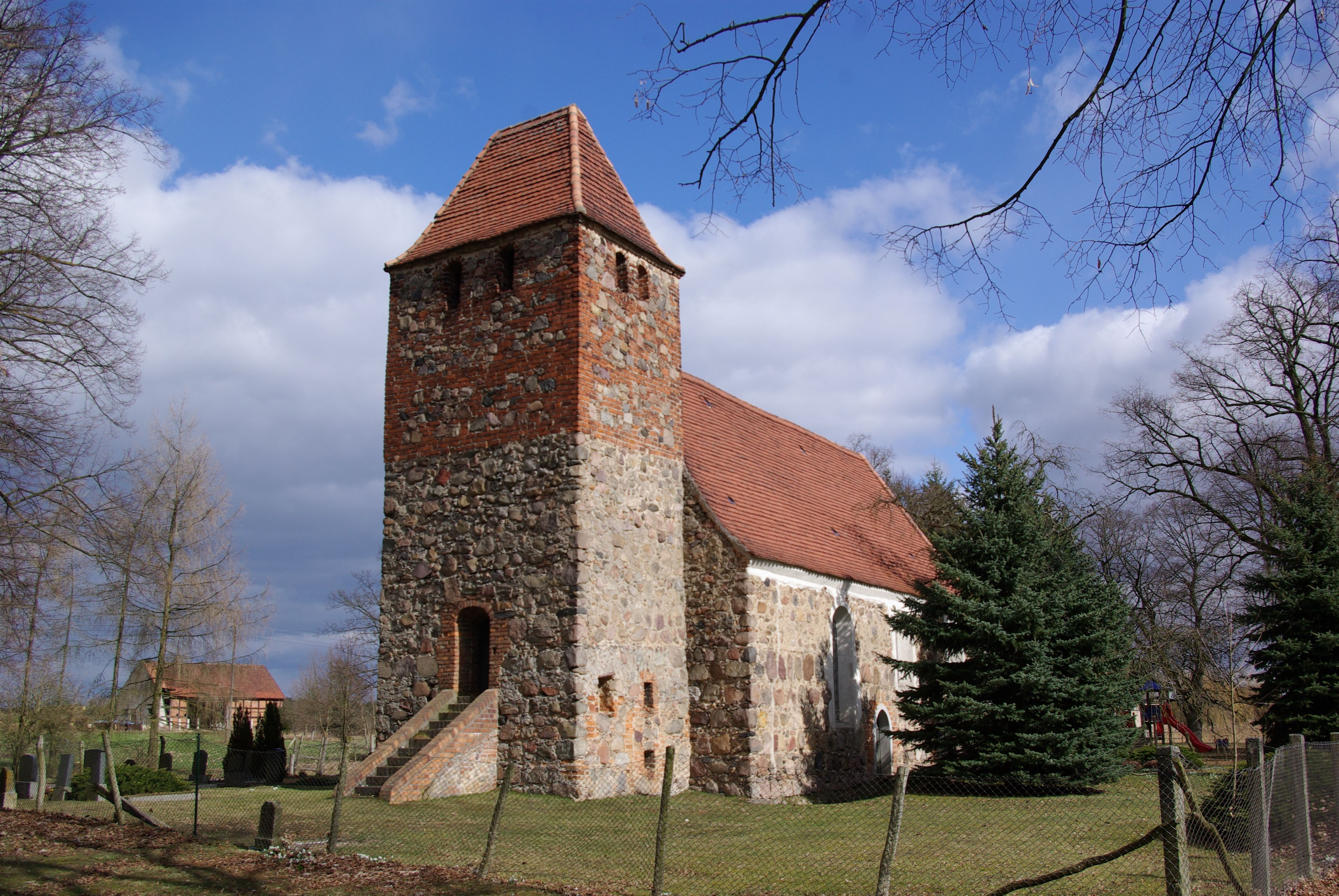 Steinreich in Brandenburg. Die Kirche im Ortsteil Schenkendorf steht unter Denkmalschutz.